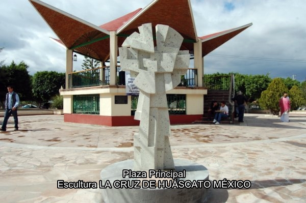 cruzhuascato